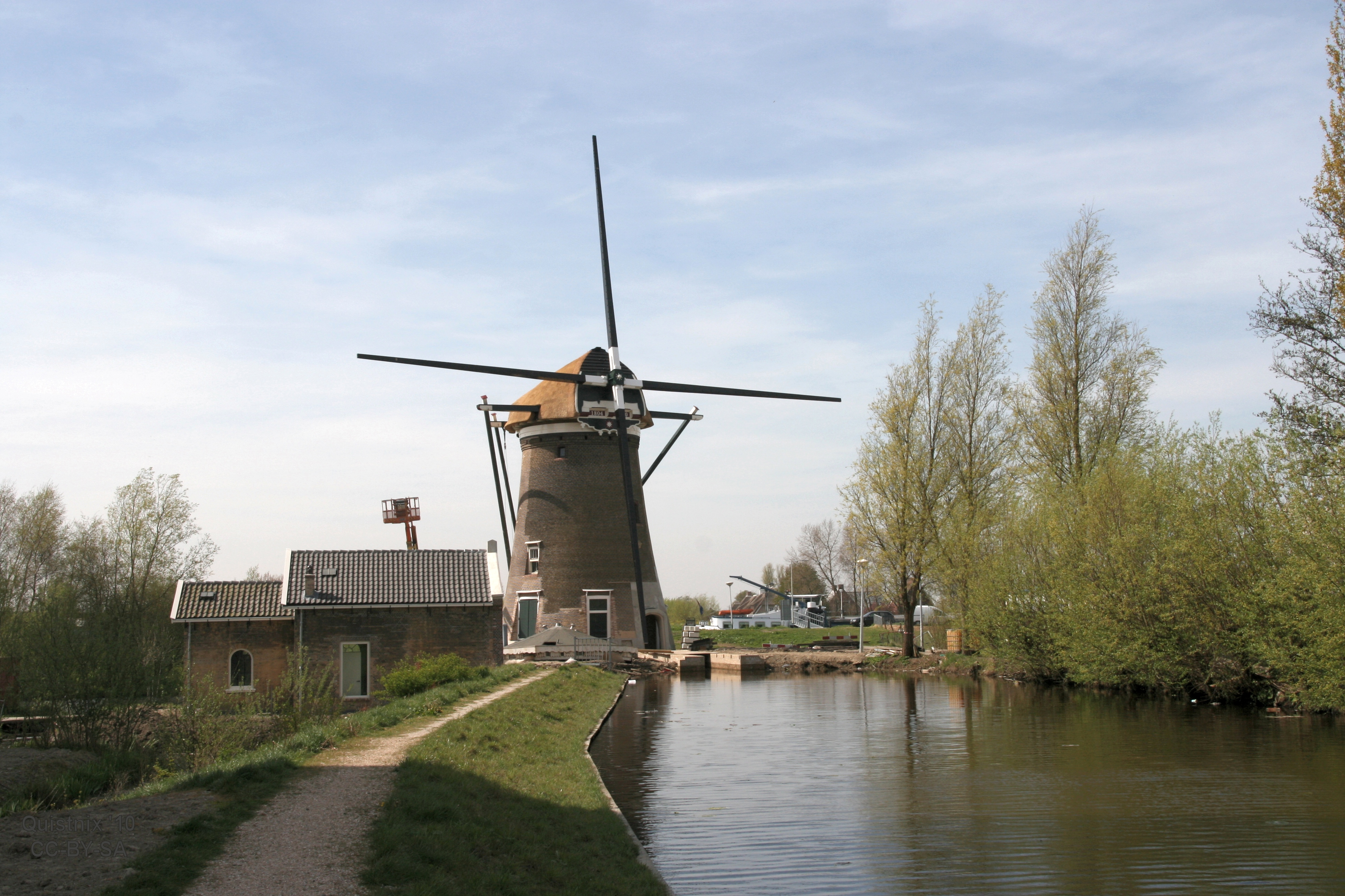 Gouda: Mallemolen, almost complete